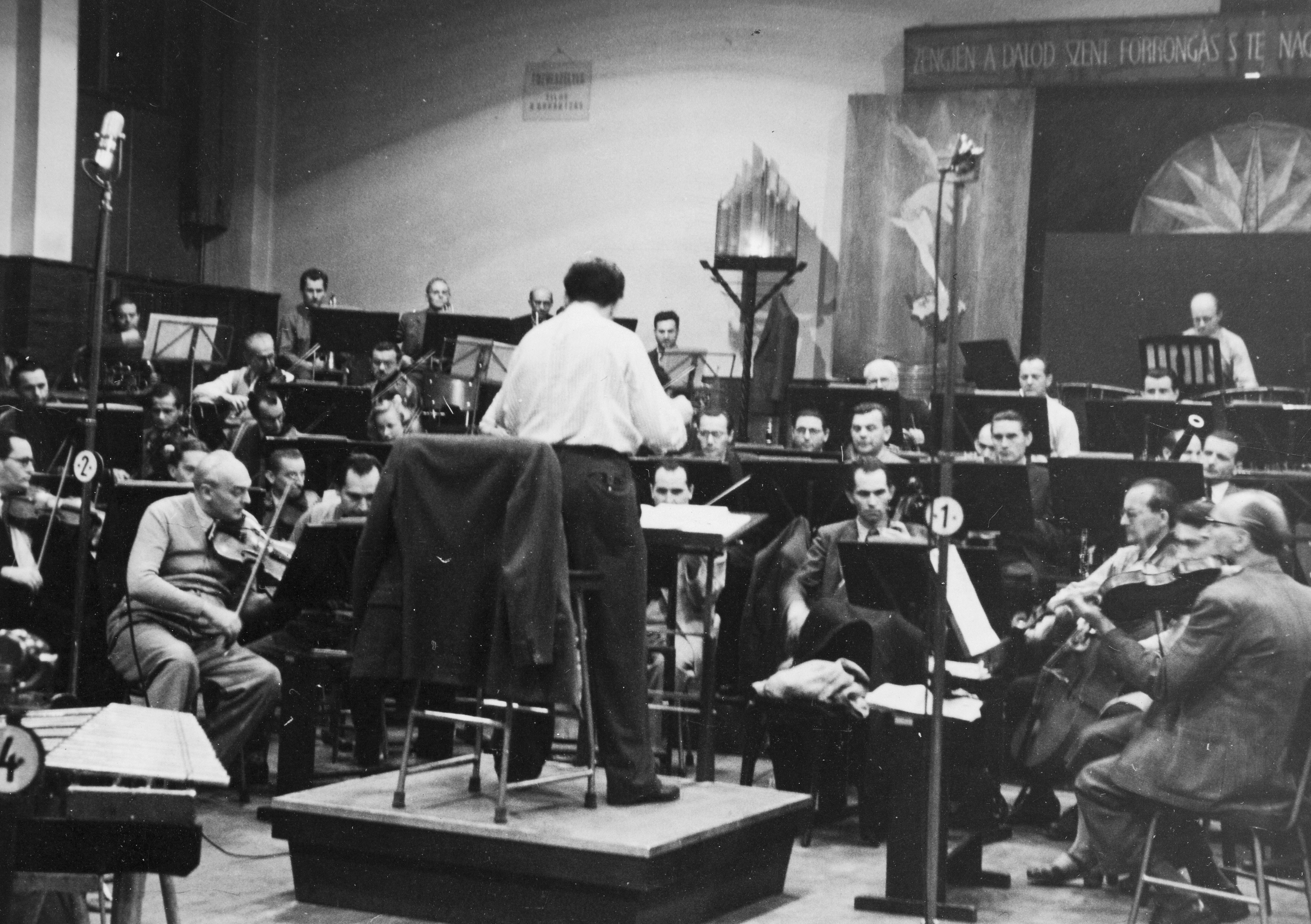 a Magyar Rádió zenekara a 6-os stúdióban, vezényel Lehel György. Location: Hungary, Budapest VIII. Tags: Budapest, Hungarian Radio Title: a Magyar Rádió zenekara a 6-os stúdióban, vezényel Lehel György.